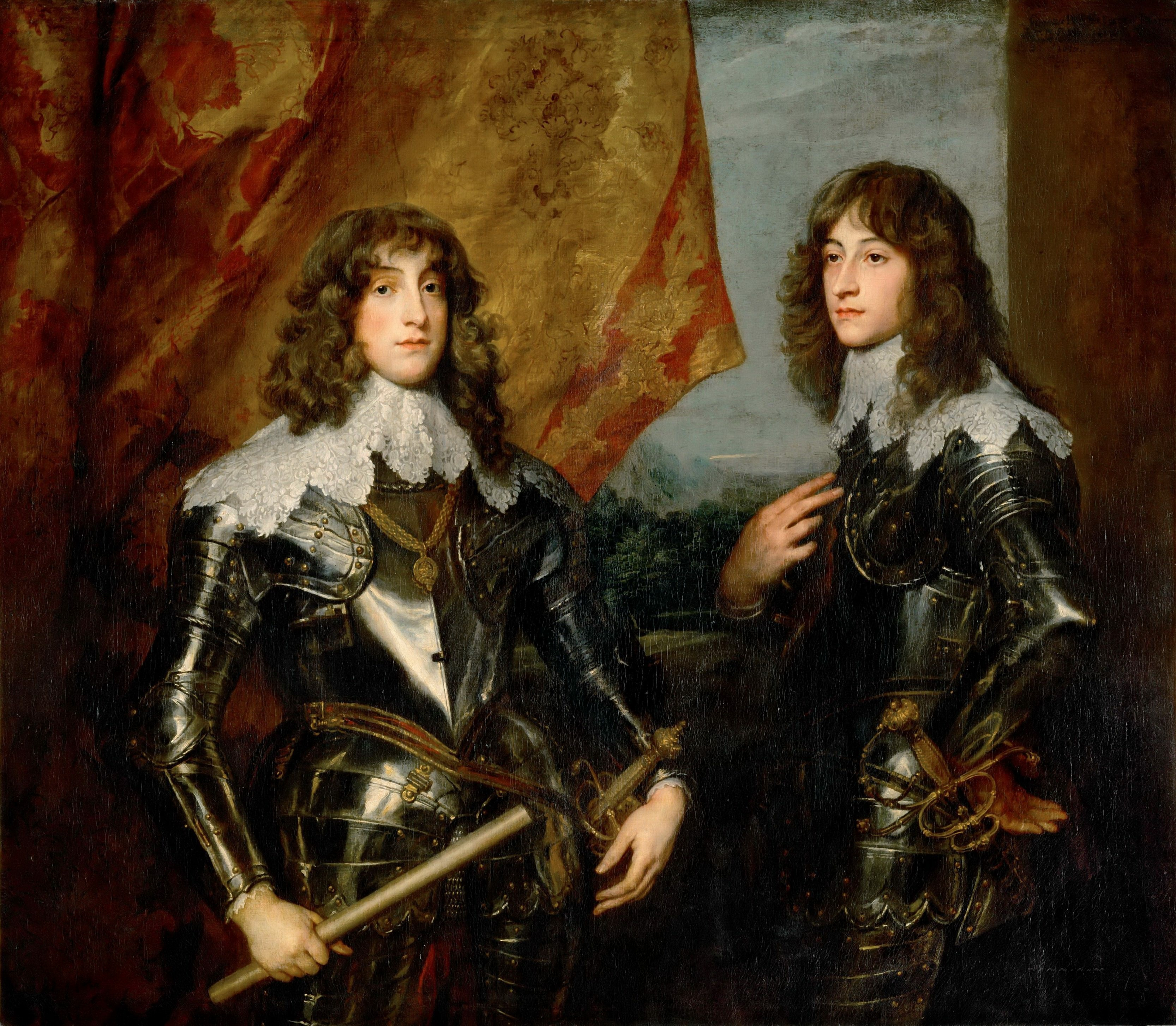 Charles-Louis and Robert de Bavière